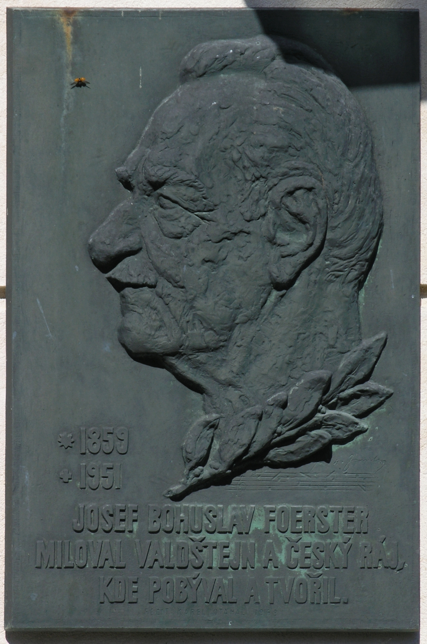 Valdštejn - pamětní deska Josefa Bohuslava Foerstera u vstupní brány